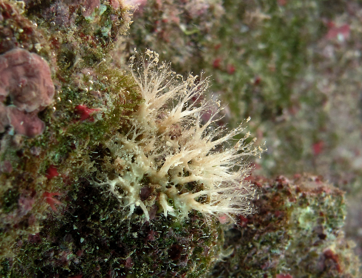 Un foraminifère benthique, probablement Miniacina miniacea à la Réunion.